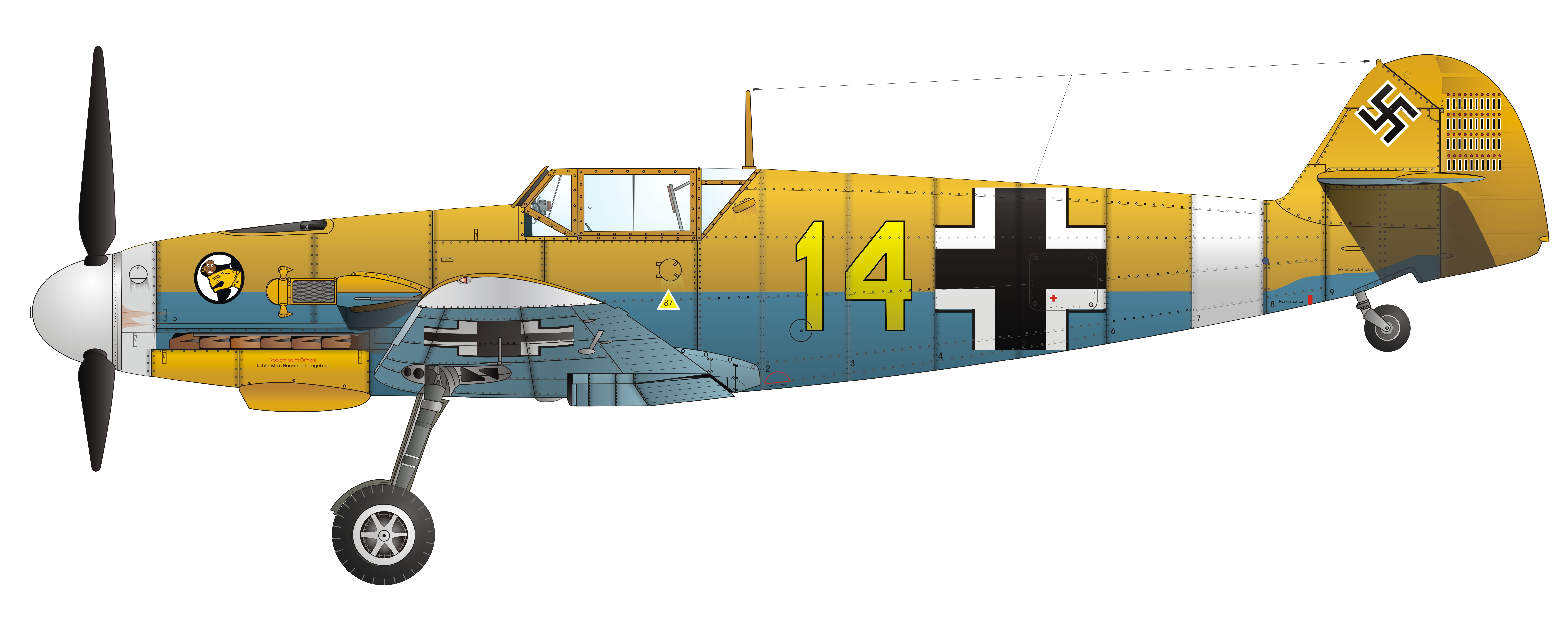 Bf 109F-4/Trop, Hans-Joachim Marseille